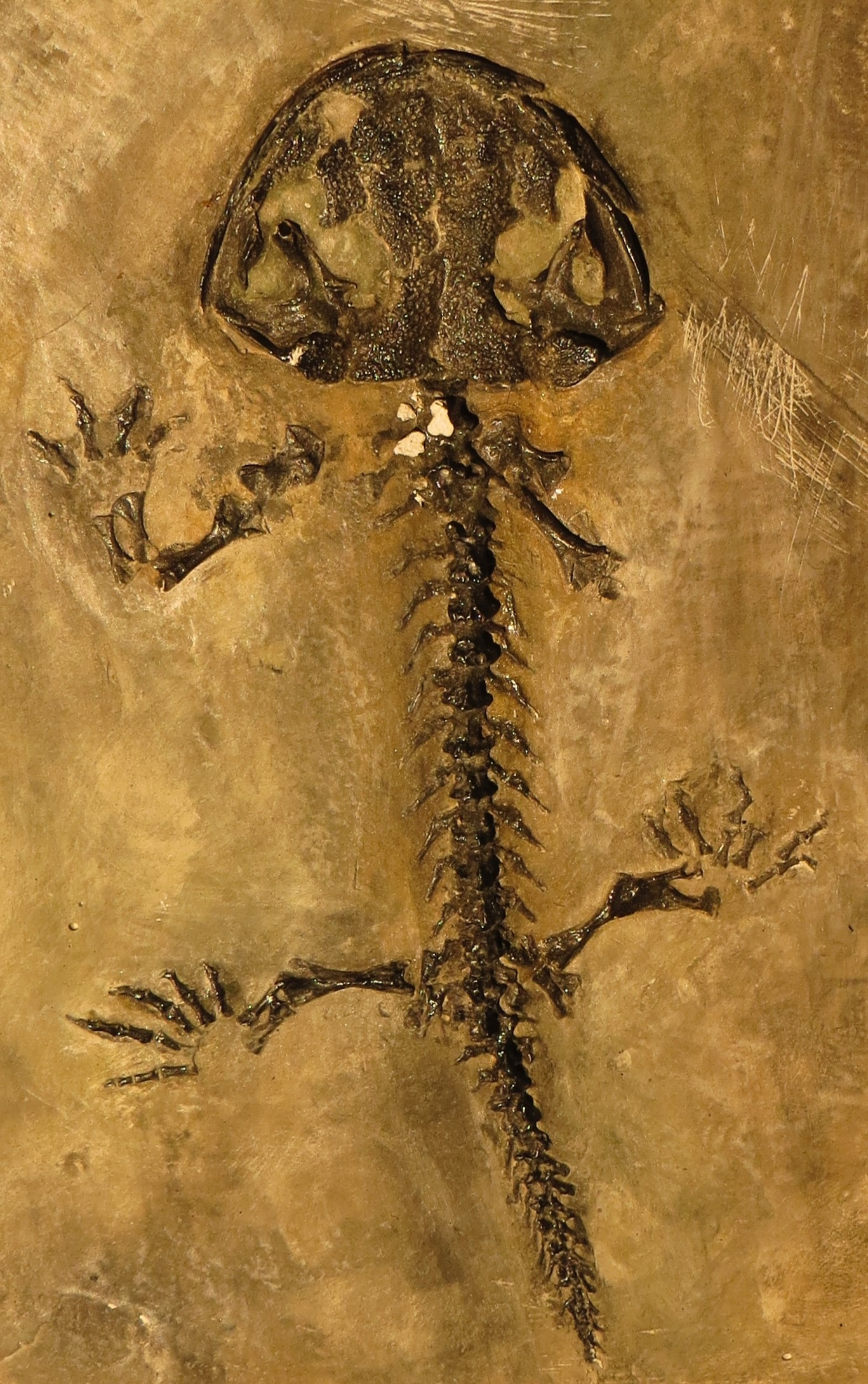 Fossil of Karaurus, an extinct amphibian- Took the picture at Dinosaurium, Prague